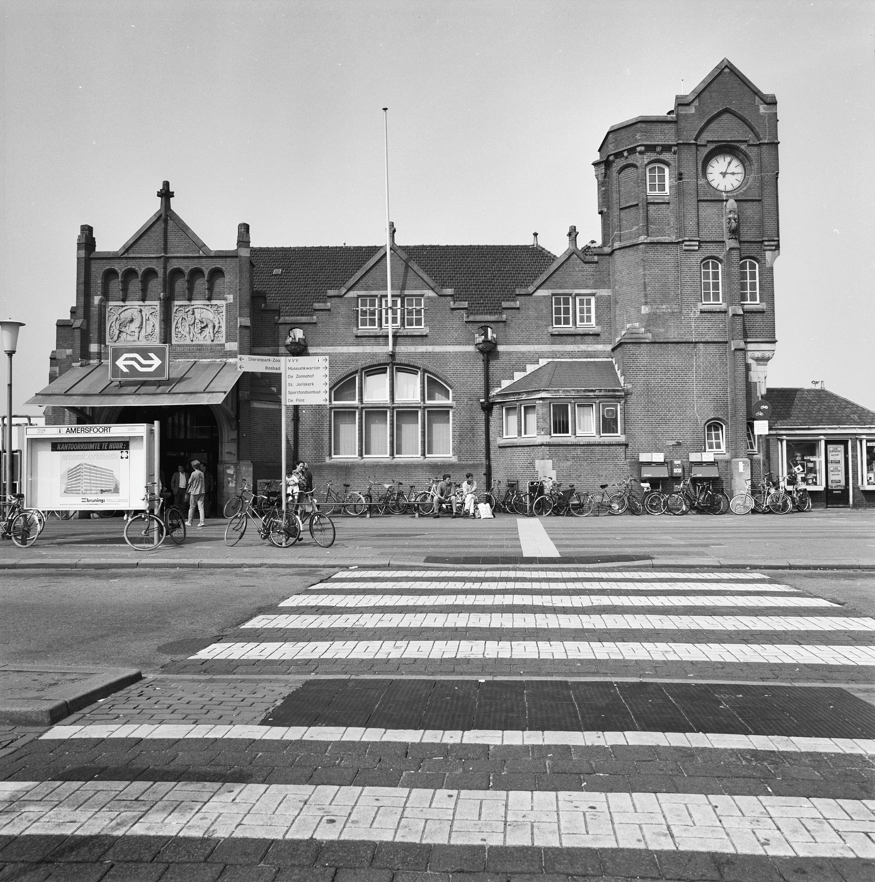 N.S. Station: Exterieur VOORGEVEL